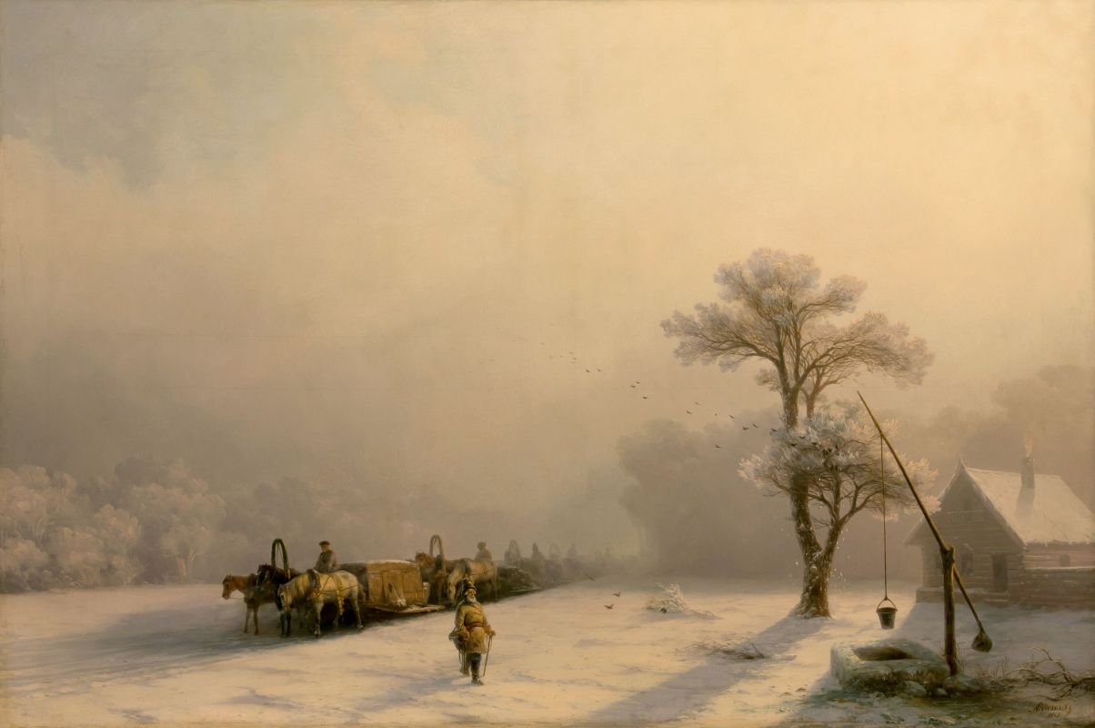 Ivan Aivazovsky. Winter Caravan on Road (1857). Smolensk Art Gallery